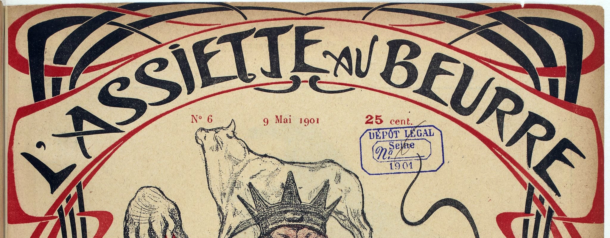 Title design